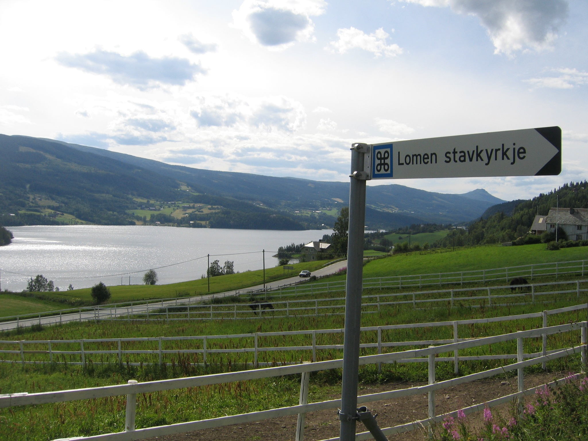 E16 ved Lomen. Vatnet er Slidrefjorden.